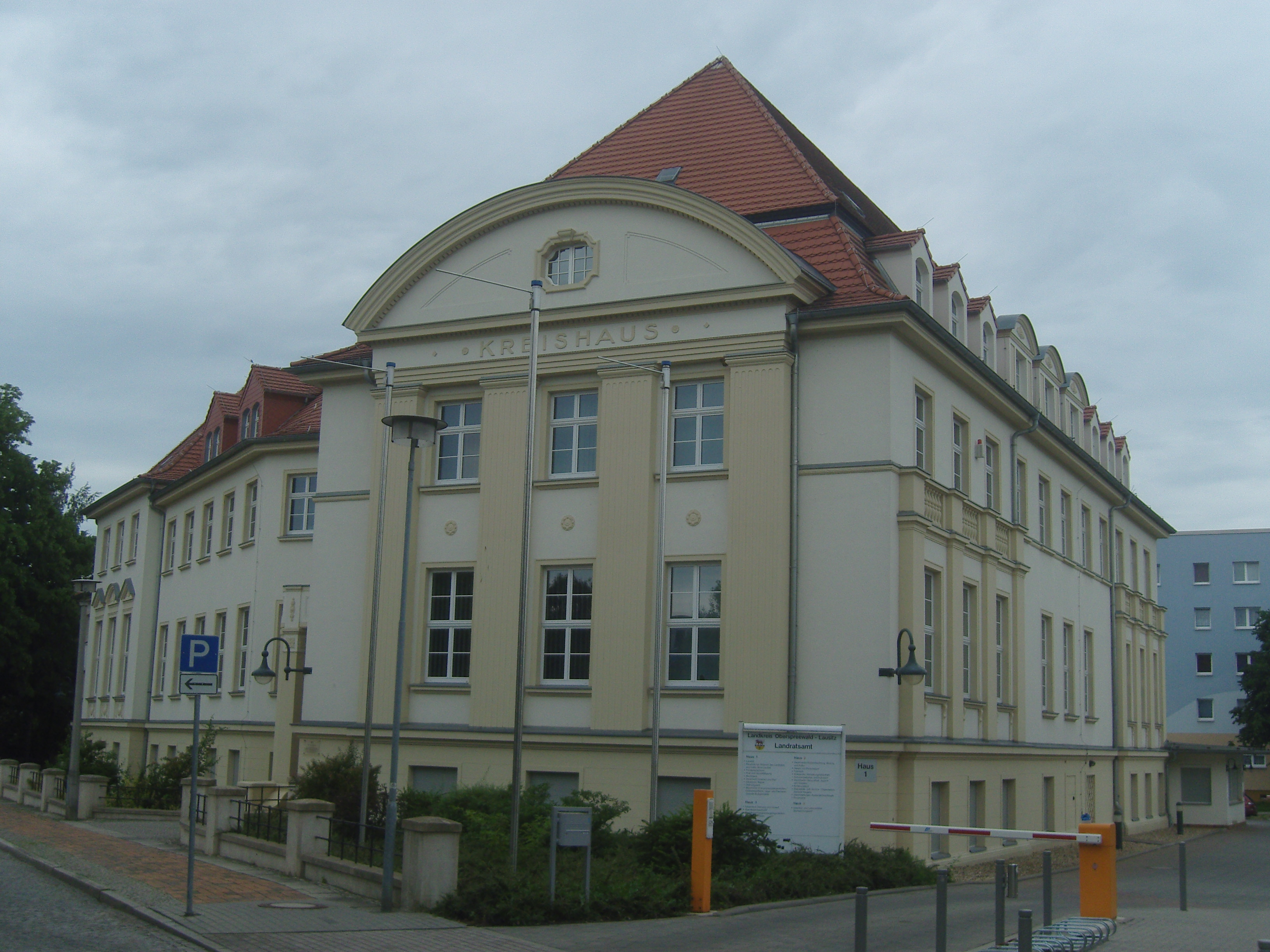 Bergbauhaus in Senftenberg; Sitz des Landratsamtes